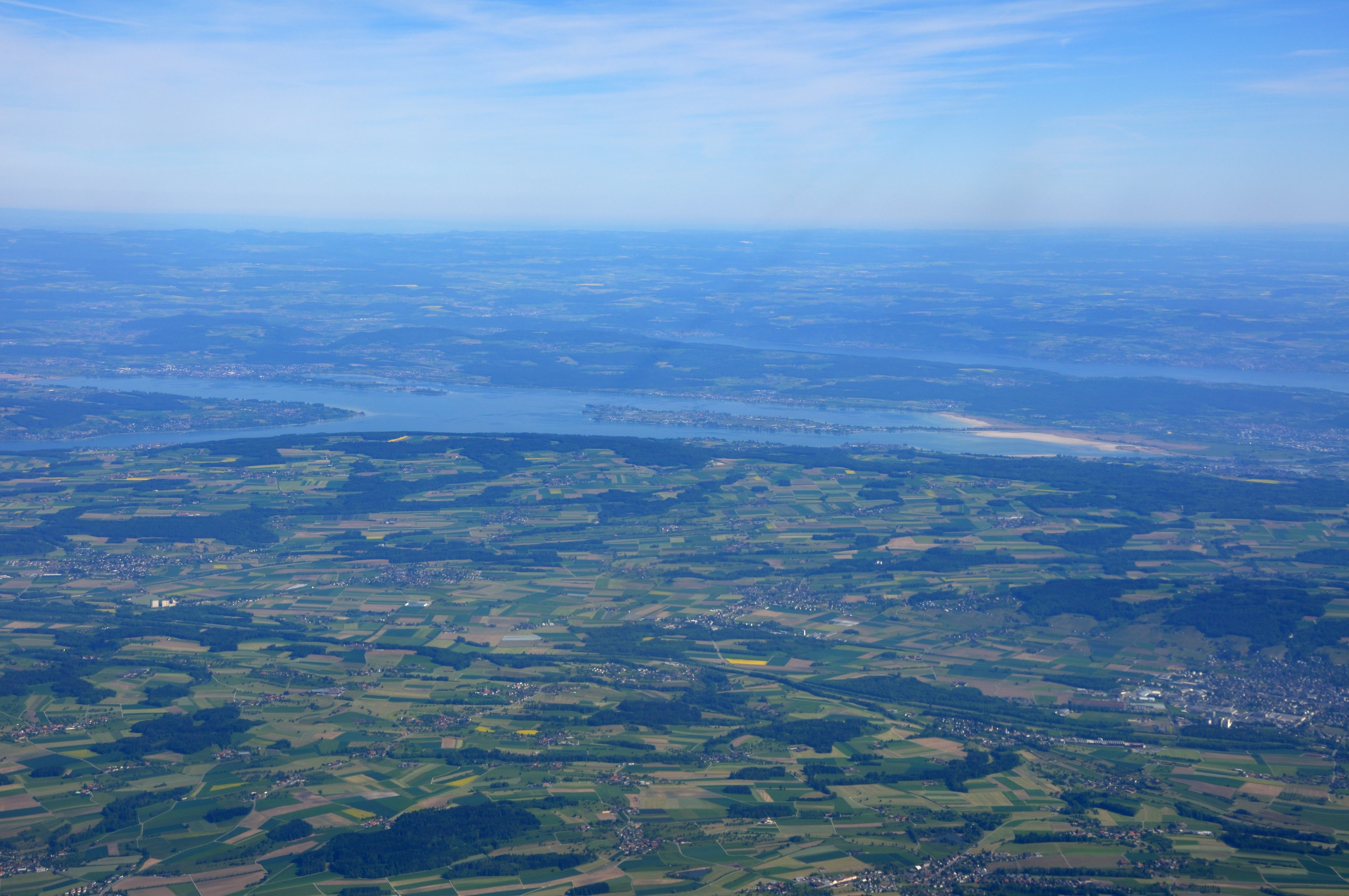 Switzerland, Thurgau, aerial view overhead Rickenbach